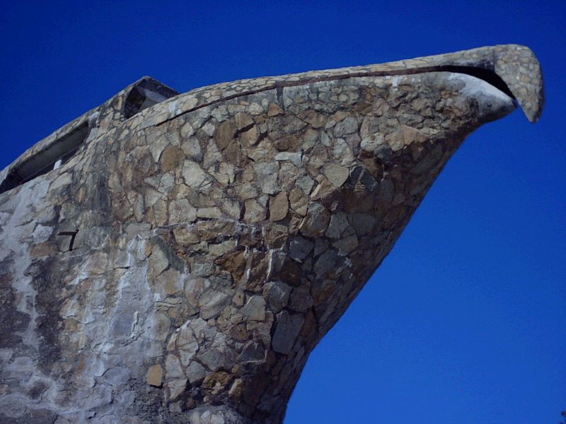 Una vista de "El Aguila". "El Aguila", de Atlántida, Canelones, República Oriental del Uruguay.